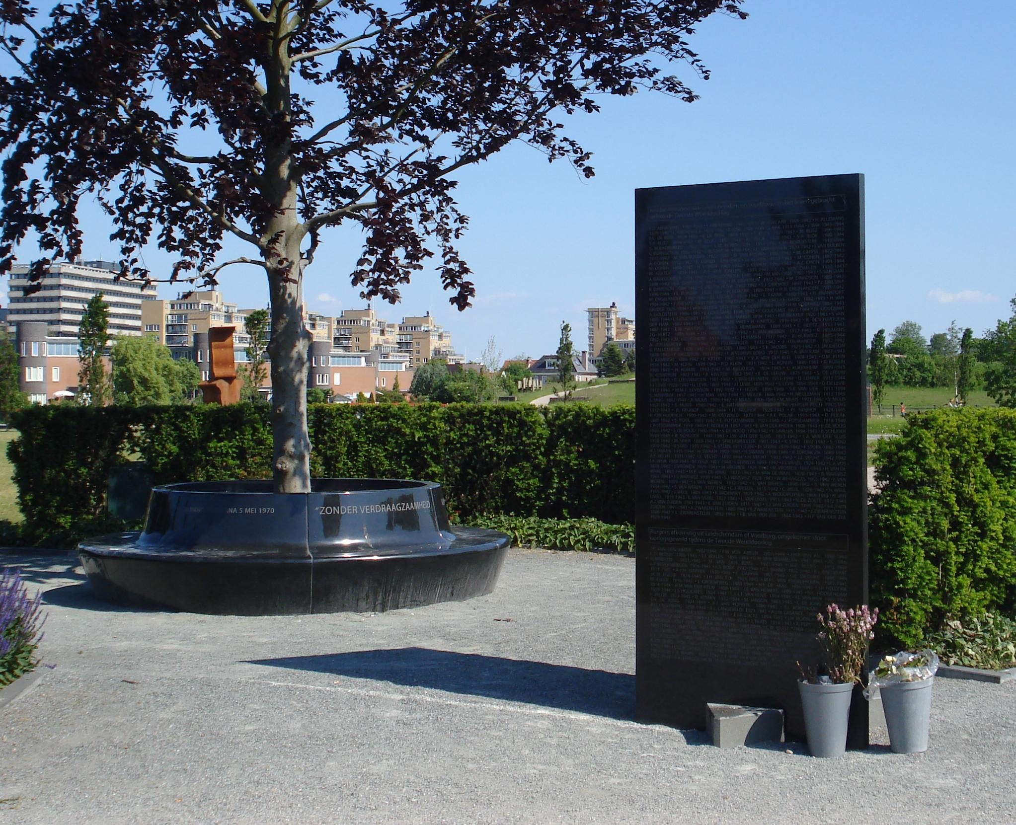 Voorburg, Park Sijtwende. Oorlogsmonument ontworpen door Inbo. Voorburg/The Netherlands. FOP.